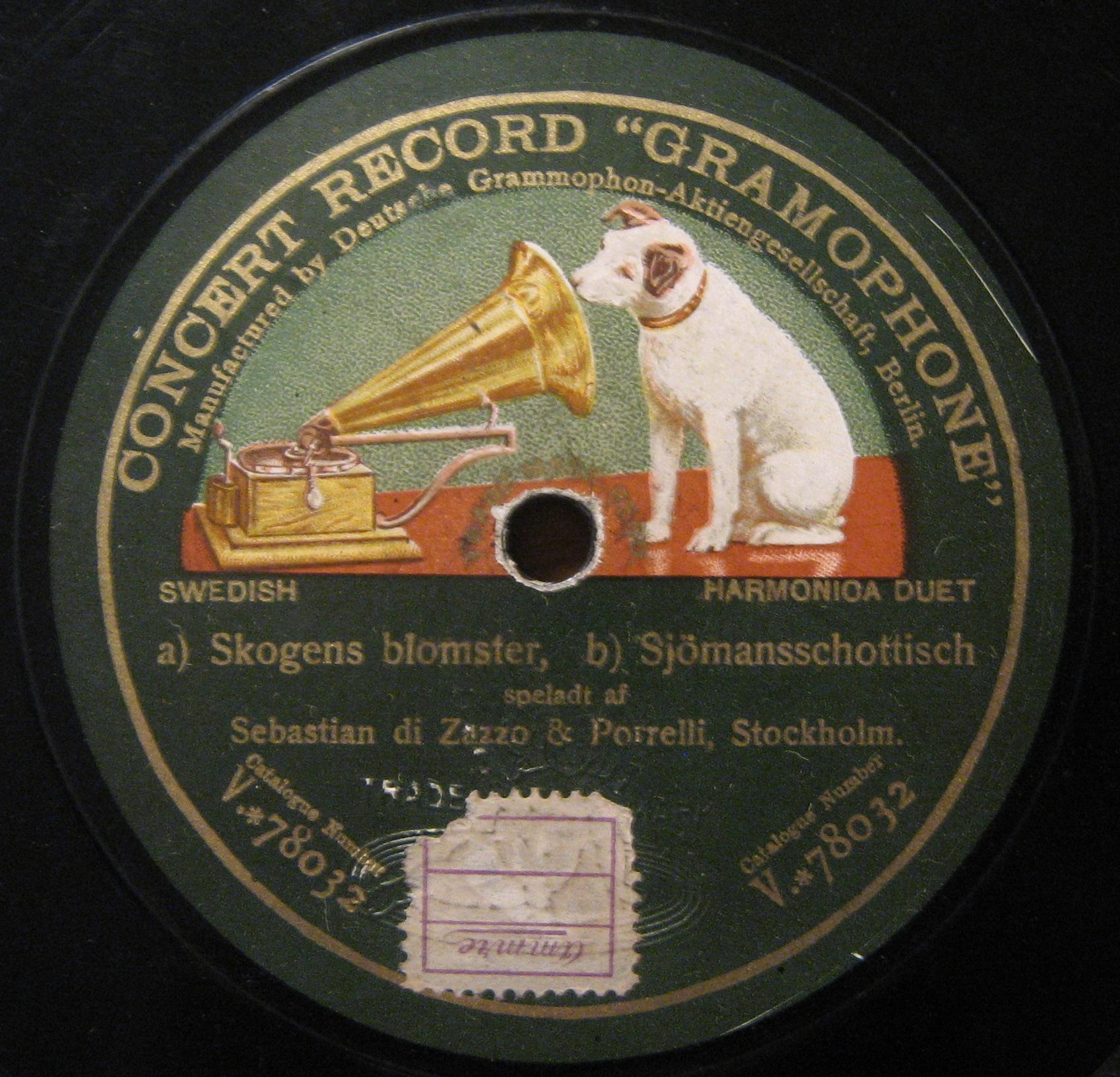 Inspelning på Concert Record Gramophone Februari 1910.